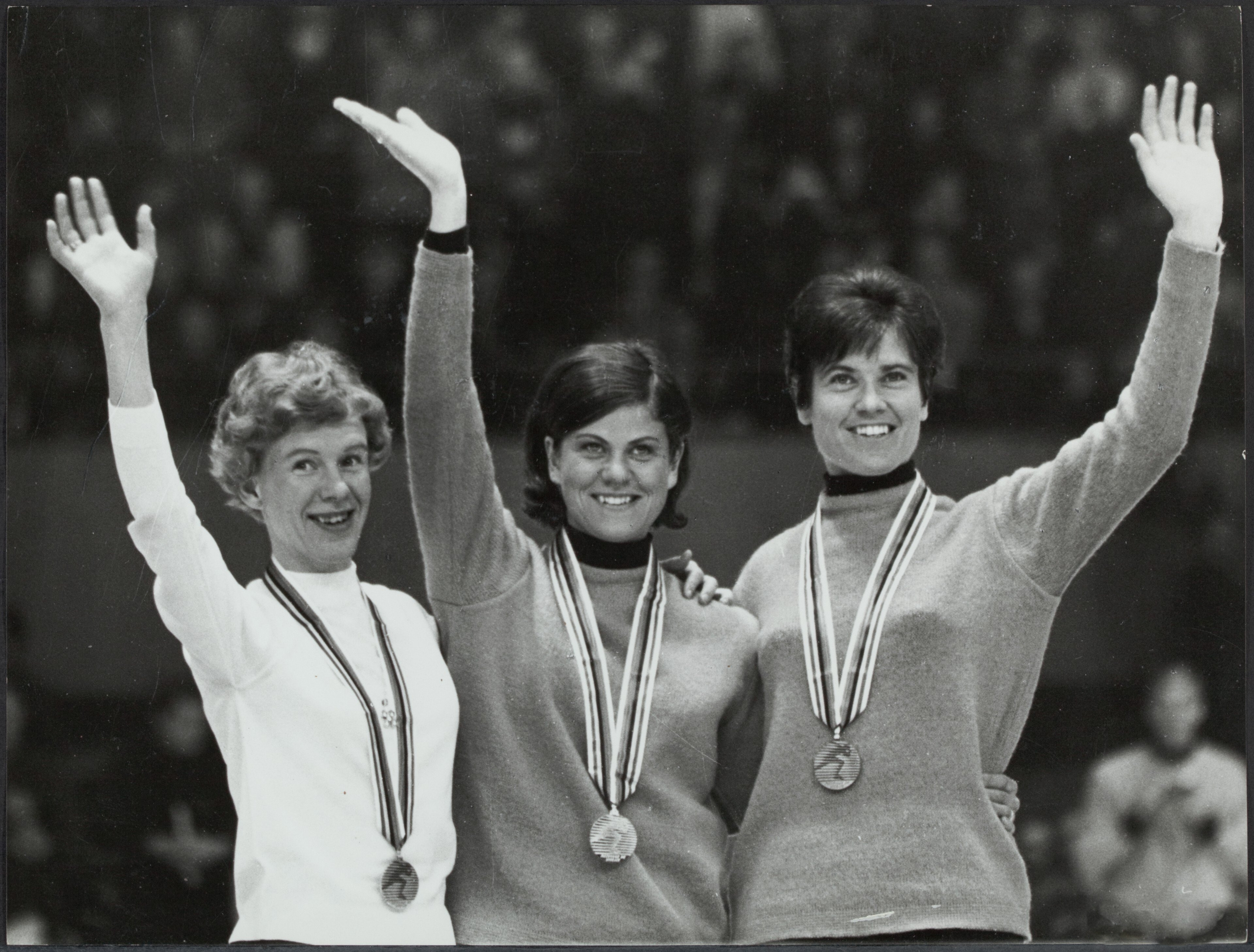 Collectie / Archief : Fotocollectie Rijksvoorlichtingsdienst Eigen Reportage / Serie : [ onbekend ] Beschrijving : Mustonen, Schut & Kaiser (1968 Winter Olympica) Datum : 1968 Locatie : Grenoble Trefwoorden : huldigingen, schaatsen, sport Persoonsnaam : Kaiser Stien, Schut, Ans Fotograaf : Fotograaf Onbekend / Anefo Auteursrechthebbende : Nationaal Archief Materiaalsoort : Foto (zwart/wit) Nummer archiefinventaris : bekijk toegang 2.24.10.02 Bestanddeelnummer : 135-0774 Reacties Geplaatst door Dirk Broer op 12 juni 2011 - 21:10. Huldiging 3000m Olympische Winterspelen 1968 Grenoble, van links naar rechts: 2 Kaija Mustonen, 1 Ans Schut, 3 Stien Kaiser